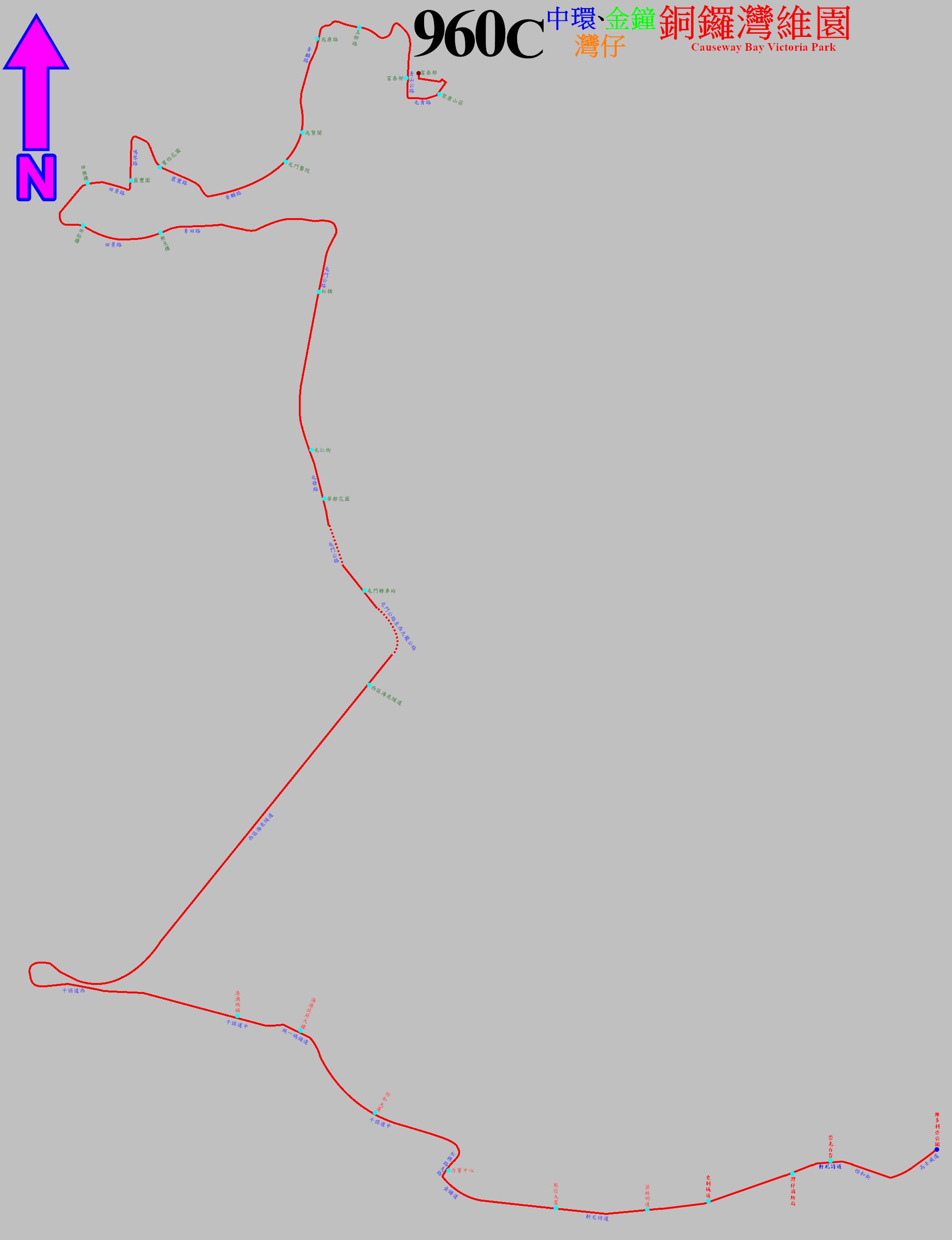 過海隧巴960C線的走線圖